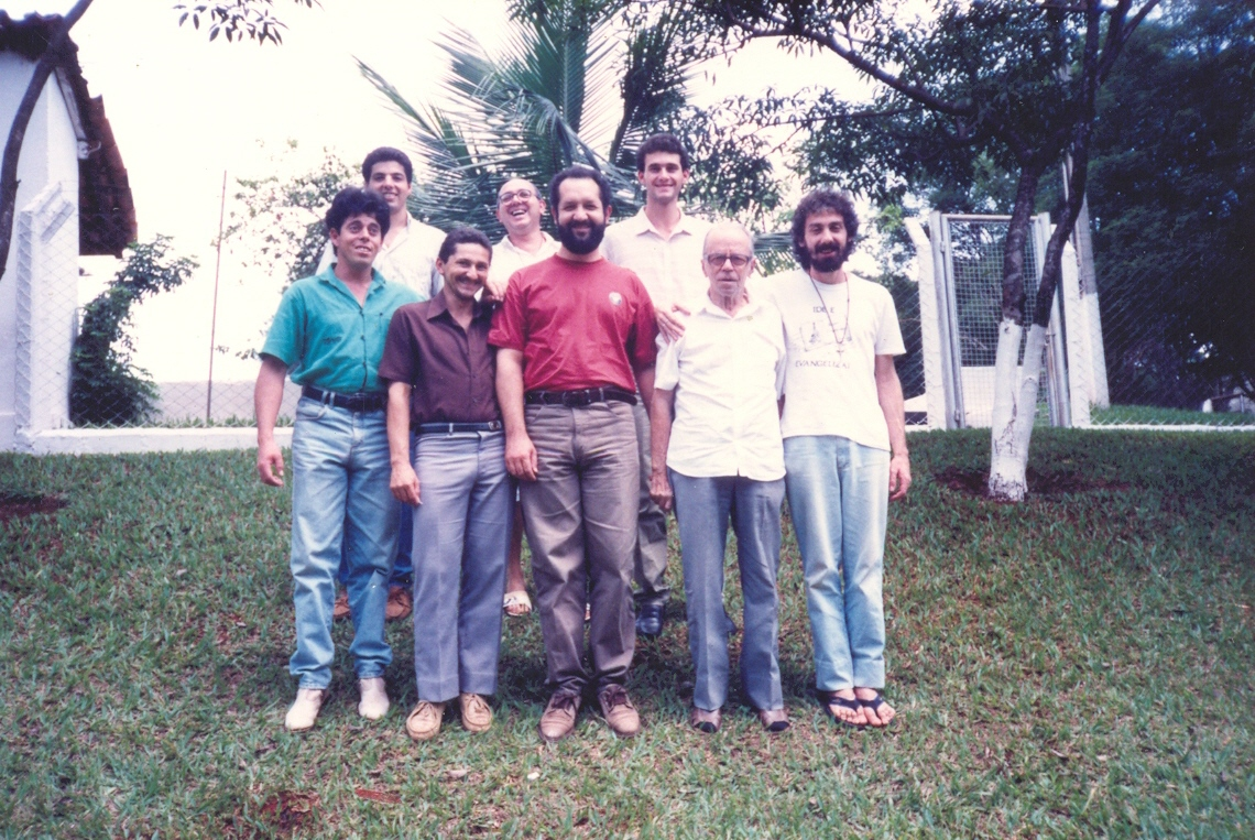 João Carlos Seneme (camiseta roja) actual obispo auxiliar de Curitiba (entonces maestro de novicios)y José Lettieri último a mano derecha (de barba).